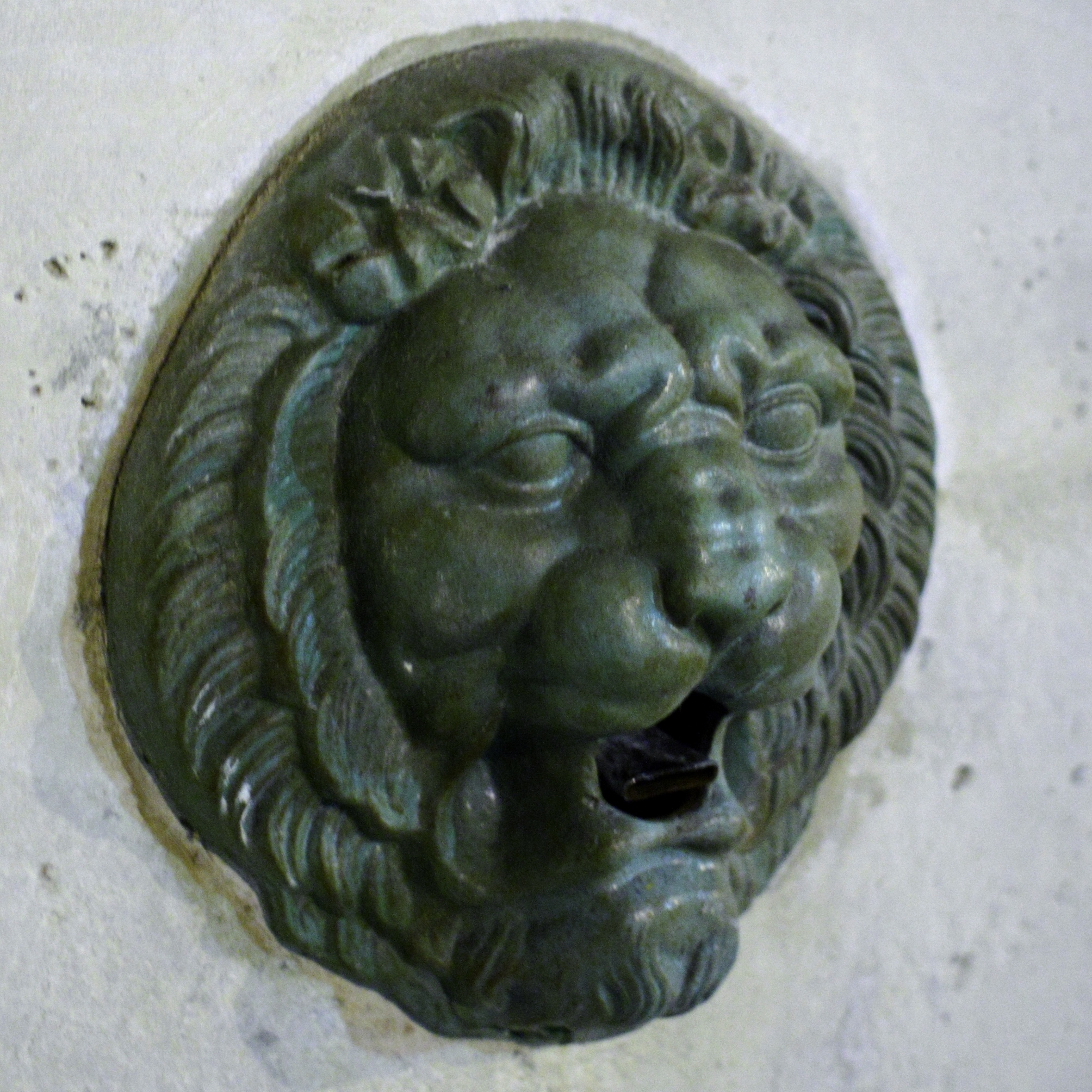 Mascaron en forme de tête de lion crachant de l'eau (quand il y a de l'eau), fontaine Trogneux, Paris